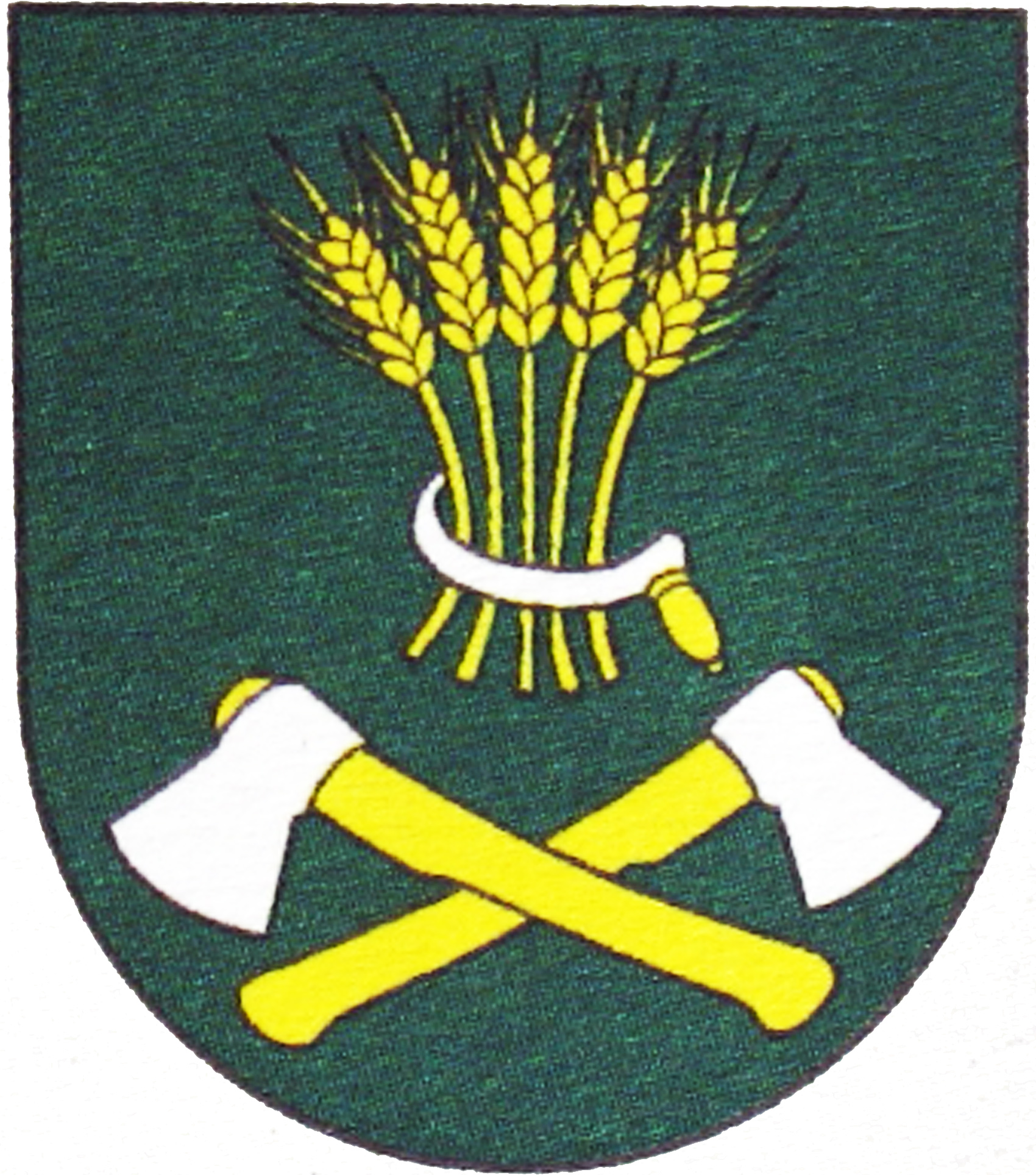 Erb obce Kalnište (HR K-175/2000): V zelenom štíte strieborné prekrížené sekery so zlatými poriskami, prevýšené piatimi zlatými klasmi obopätými strieborným kosákom so zlatou rukoväťou.